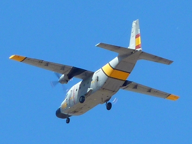 CASA C-212-200MP del Ejército del Aire Español